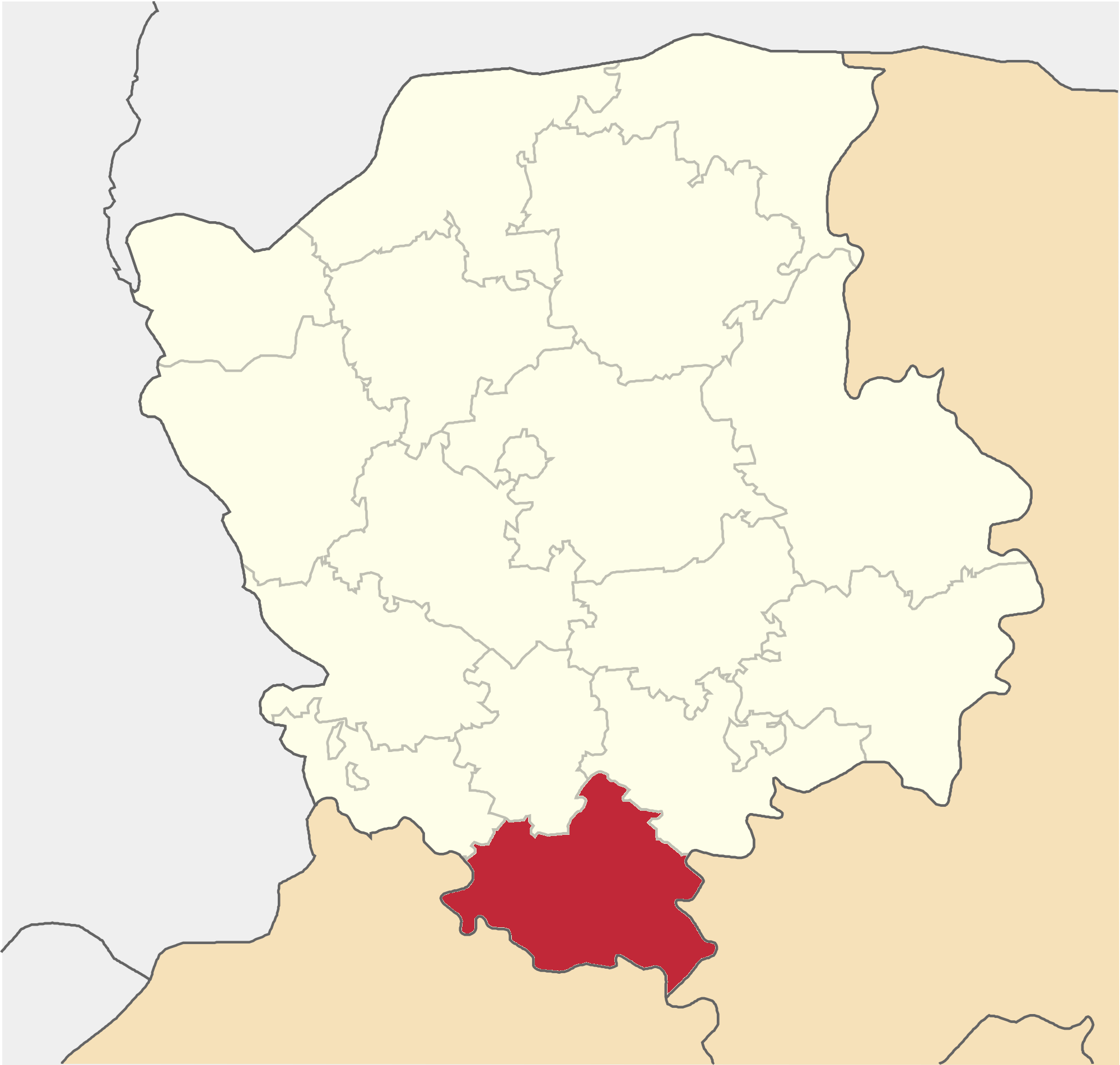 Gorohivskyi-Raion map